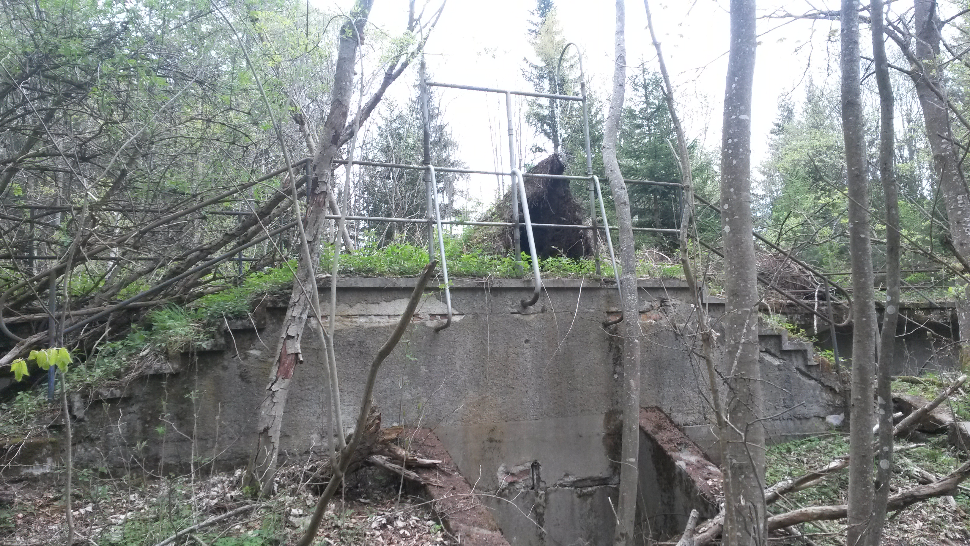 Ruine des Alpenstrandbades Semmering (Österreich): Abgang zur Liegewiese Süd.